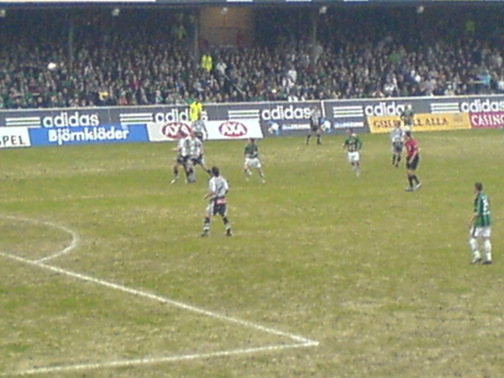 Fotbollsmatch i Allsvenskan mellan GAIS och Malmö FF (0-0). Taken in Gothenburg, Västra Götaland County, Sweden